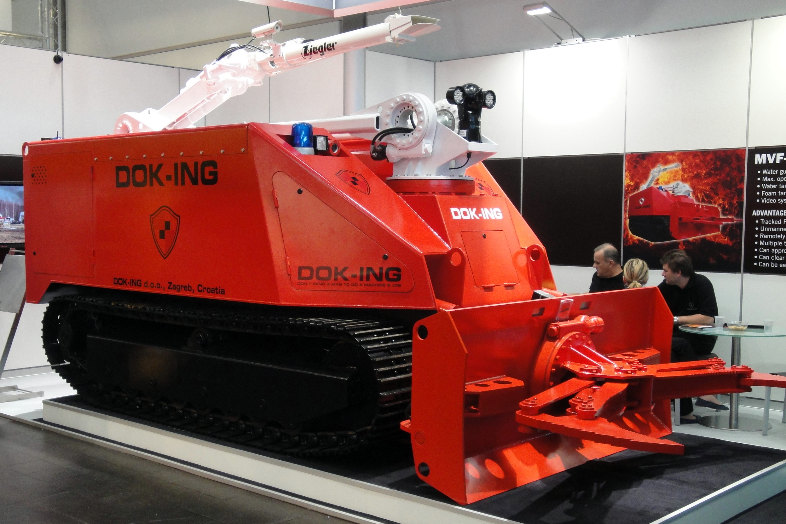 DOK-ING MVF-5 mit Ziegler Wasserwerfer, Interschutz 2010